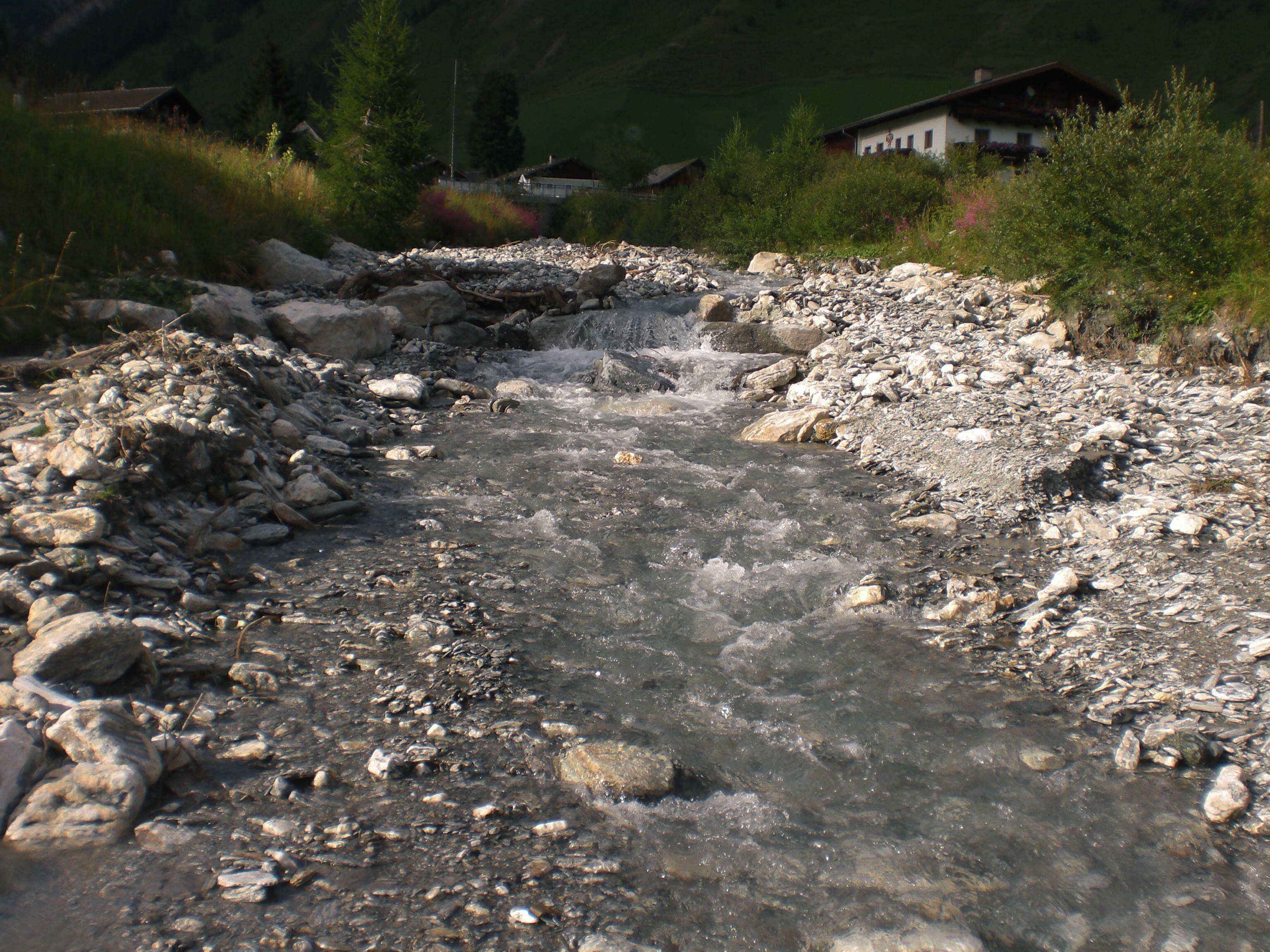 Schmirnbach von Madern aus gesehen